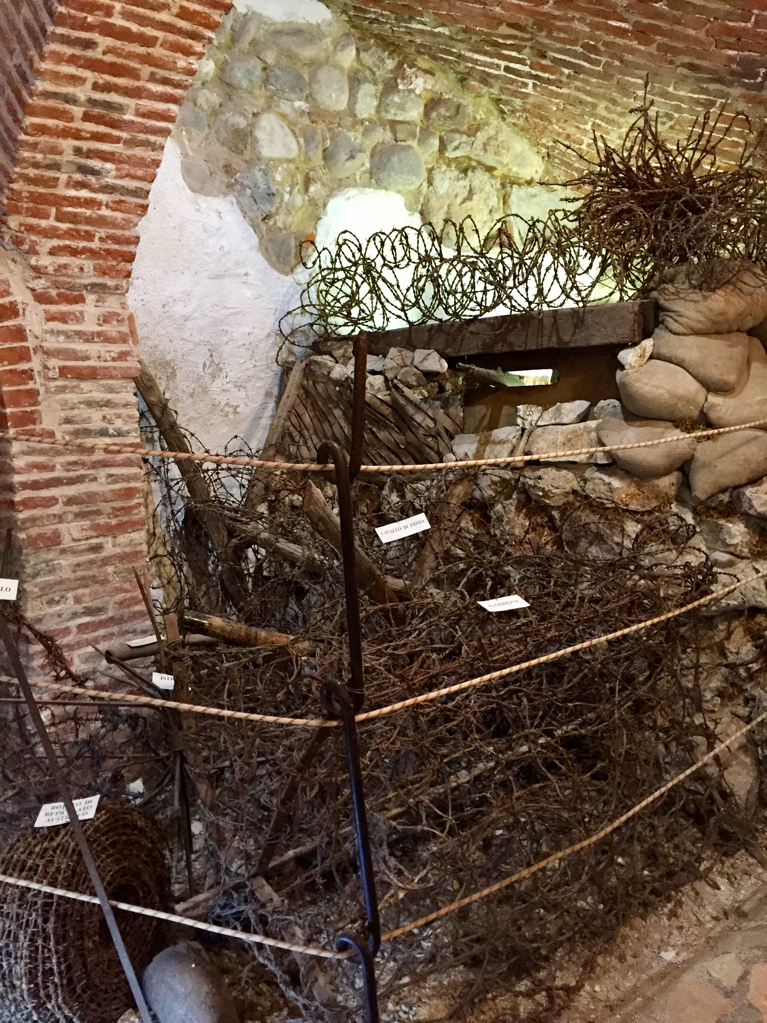 Dettaglio